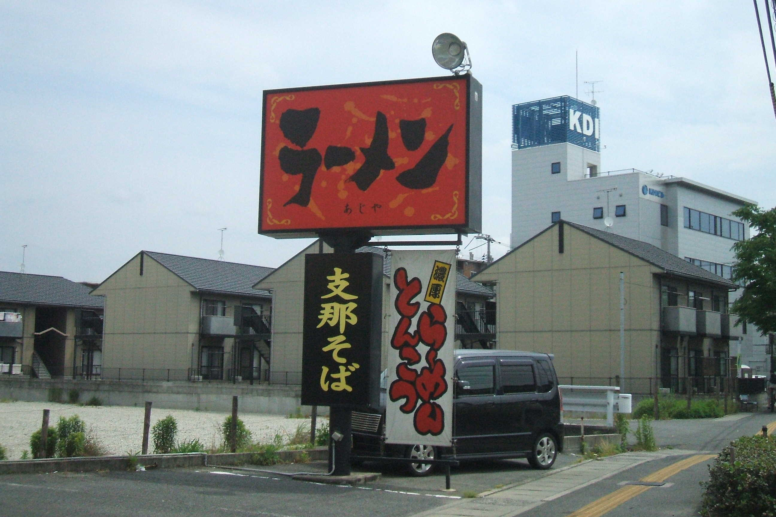 岡山県岡山市北区にある某ラーメン専門店の看板、なお「支那そば」とはラーメンの別名である。